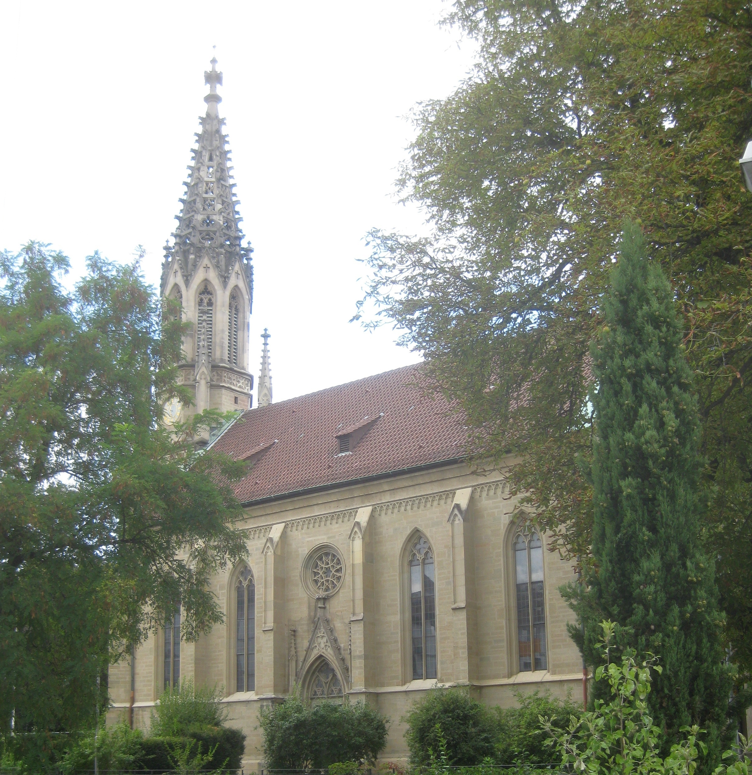 Berger Kirche in Stuttgart-Berg, Ansicht von Südosten.